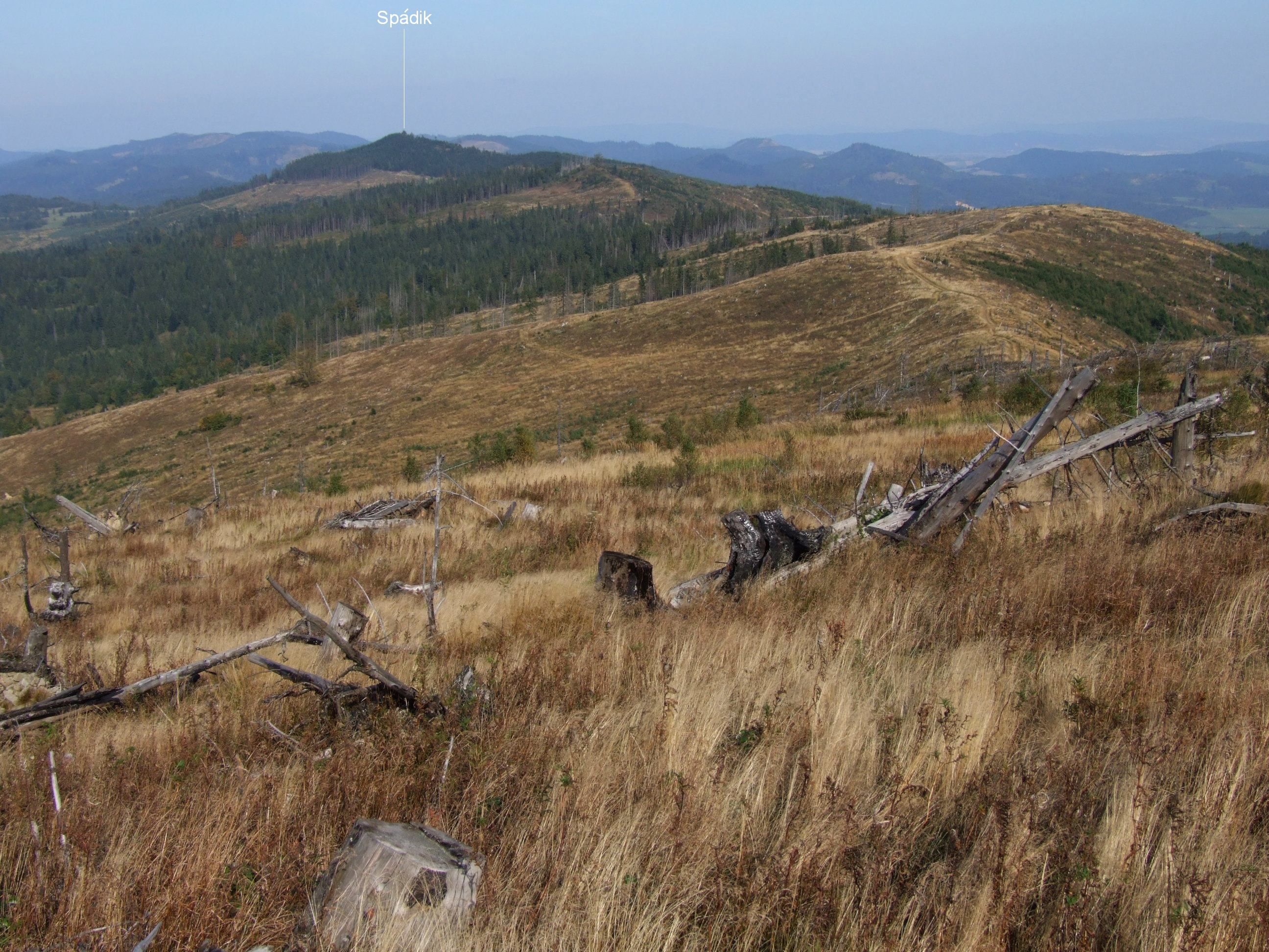 Grzbiet Magury Spiskiej po zachodniej stronie szczytu Spádik ogołocony z lasu przez wichurę w 2004 r.